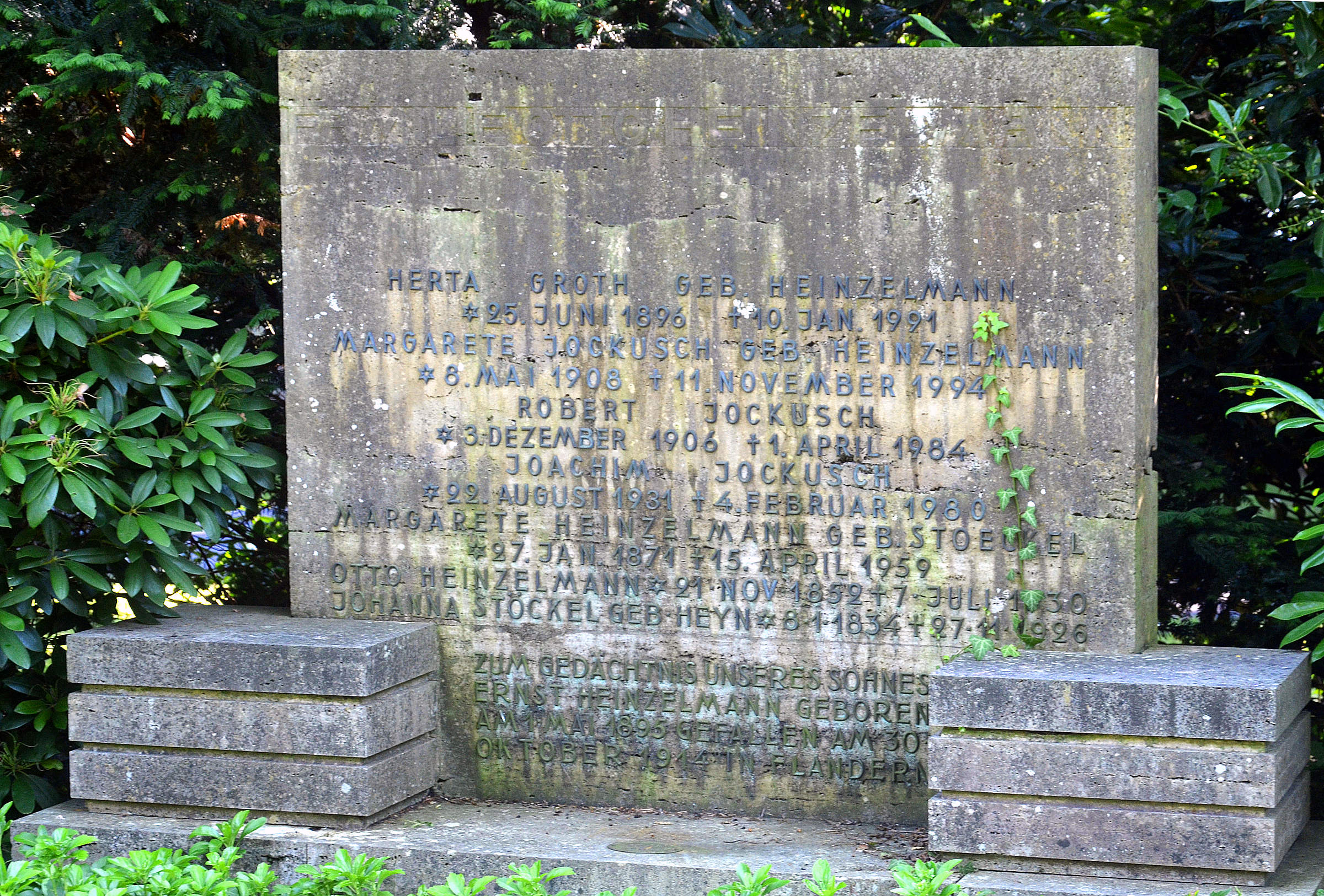 Auf dem Stadtfriedhof Engesohde findet sich das Grabmal der Familien Jokusch und Heinzelmann, darunter die Buchhändlerin „Margarete Jockusch“ geborene Heinzelmann, sowie von dem Firmengründer Otto Heinzelmann ...